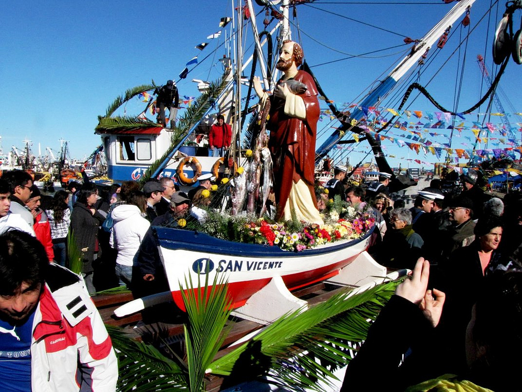 Emotiva celebración de San pedro en las aguas de Talcahuano